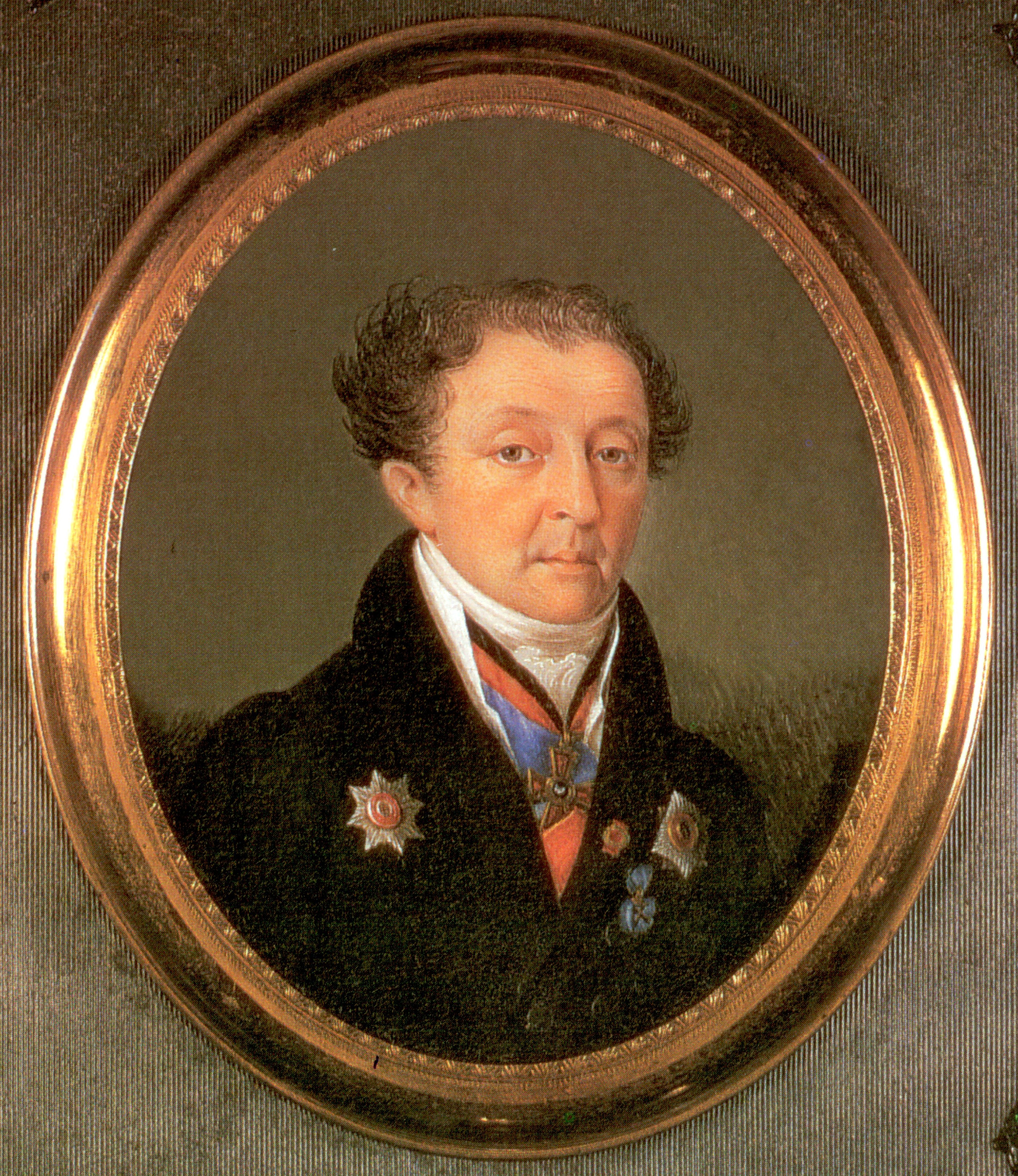 Нарышкин Иван Александрович (1761-1841)